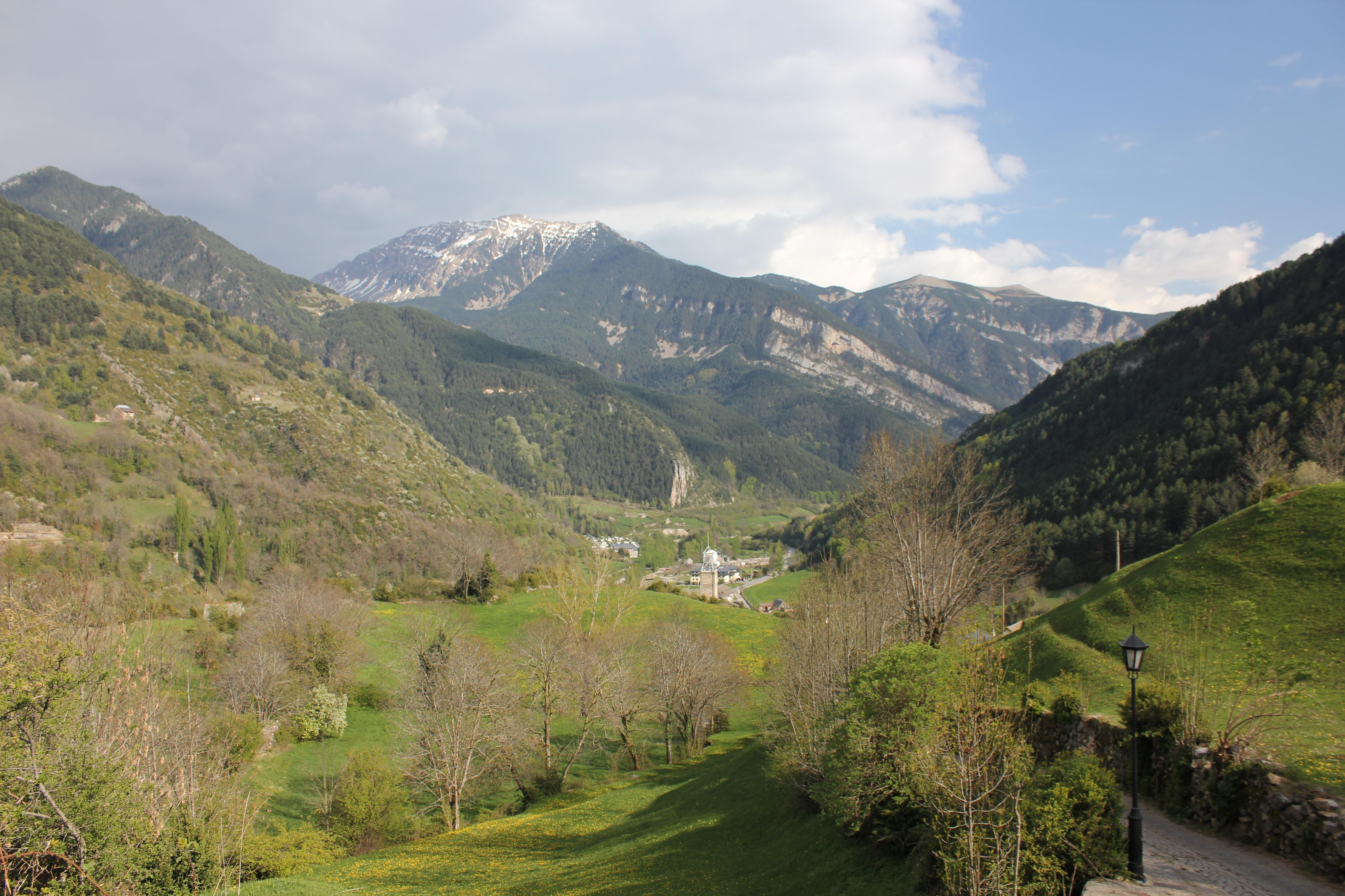 Aragonés: Bielsa